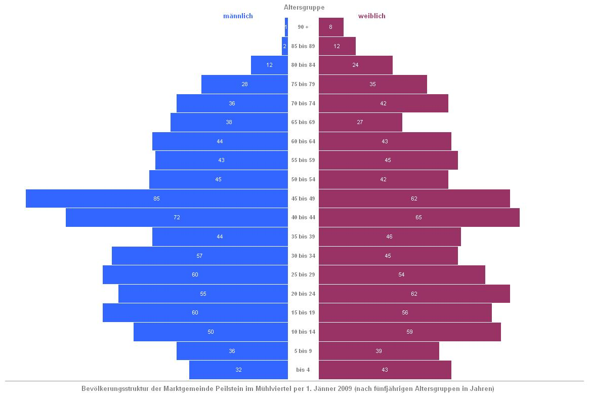 Alterspyramide Peilstein per 1.1.2009